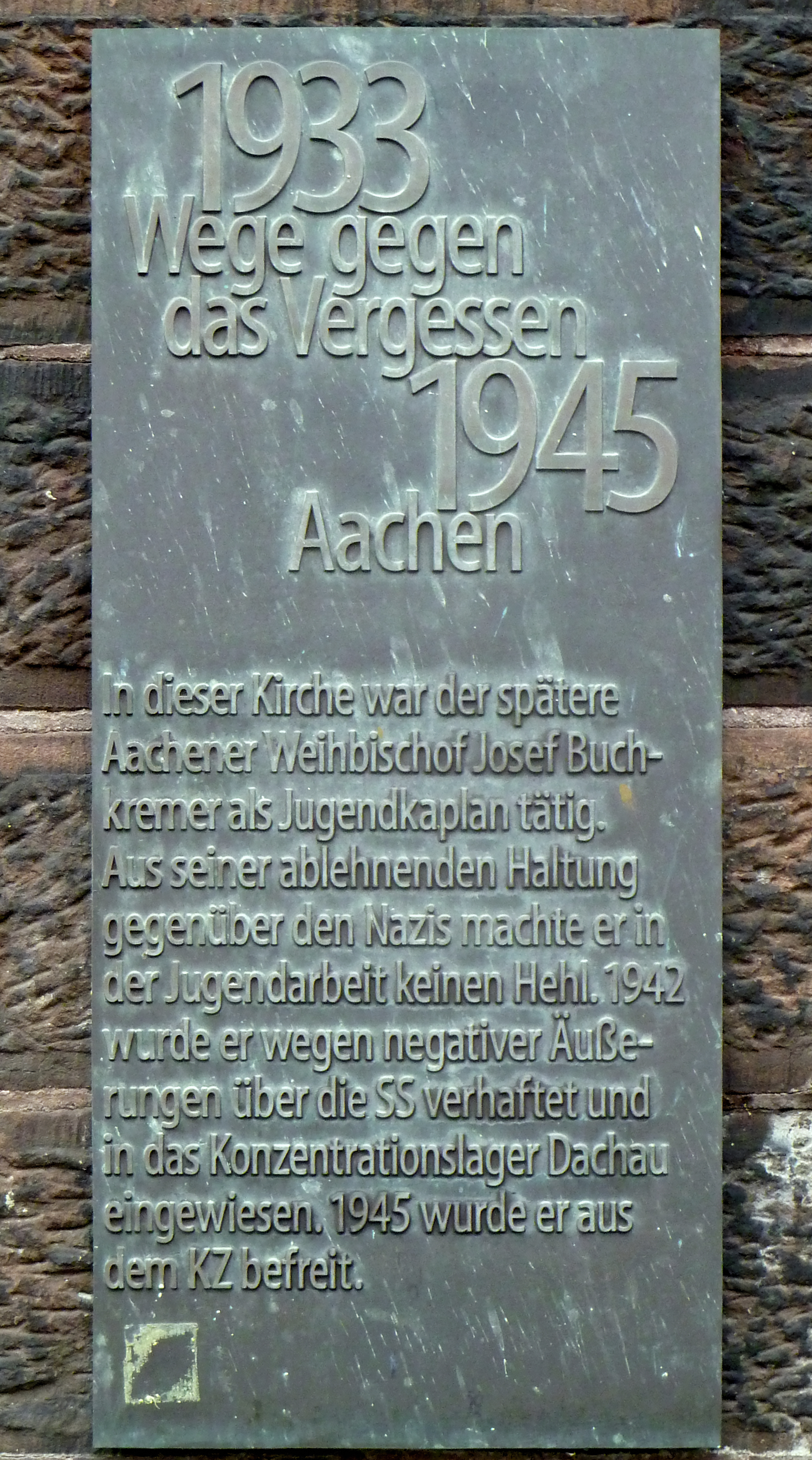 Gedenktafel im Rahmen "Wege gegen das Vergessen" an der Kirche St. Adalbert, Kaiserplatz Aachen